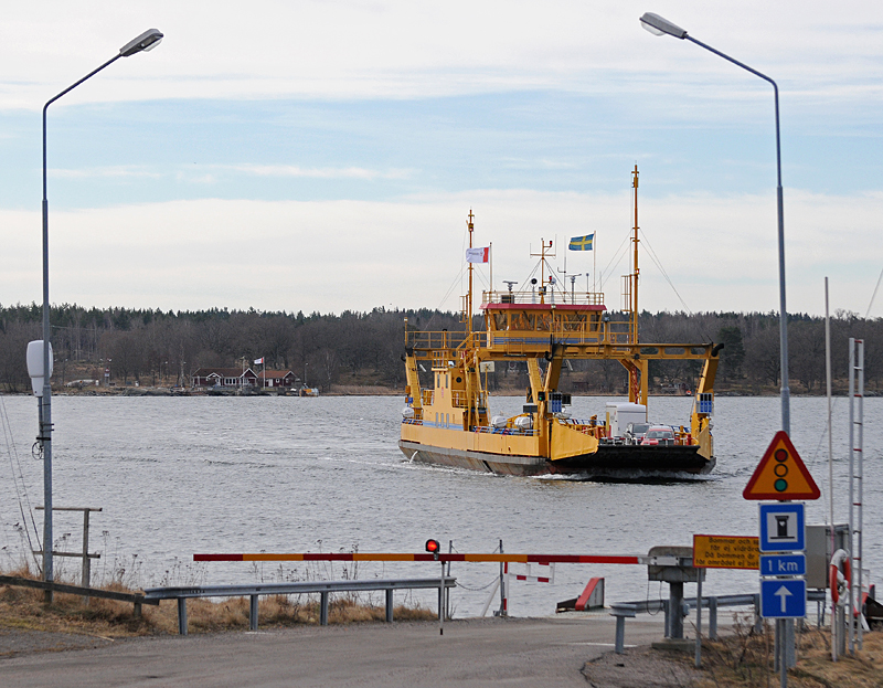 Skenäsleden färjeled över Bråviken mellan Skenäs och Säter.